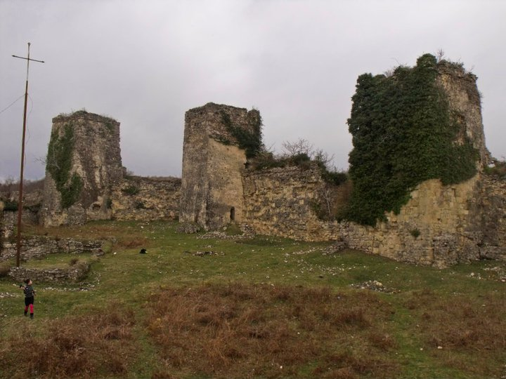 ჭაქვინჯის ციხე